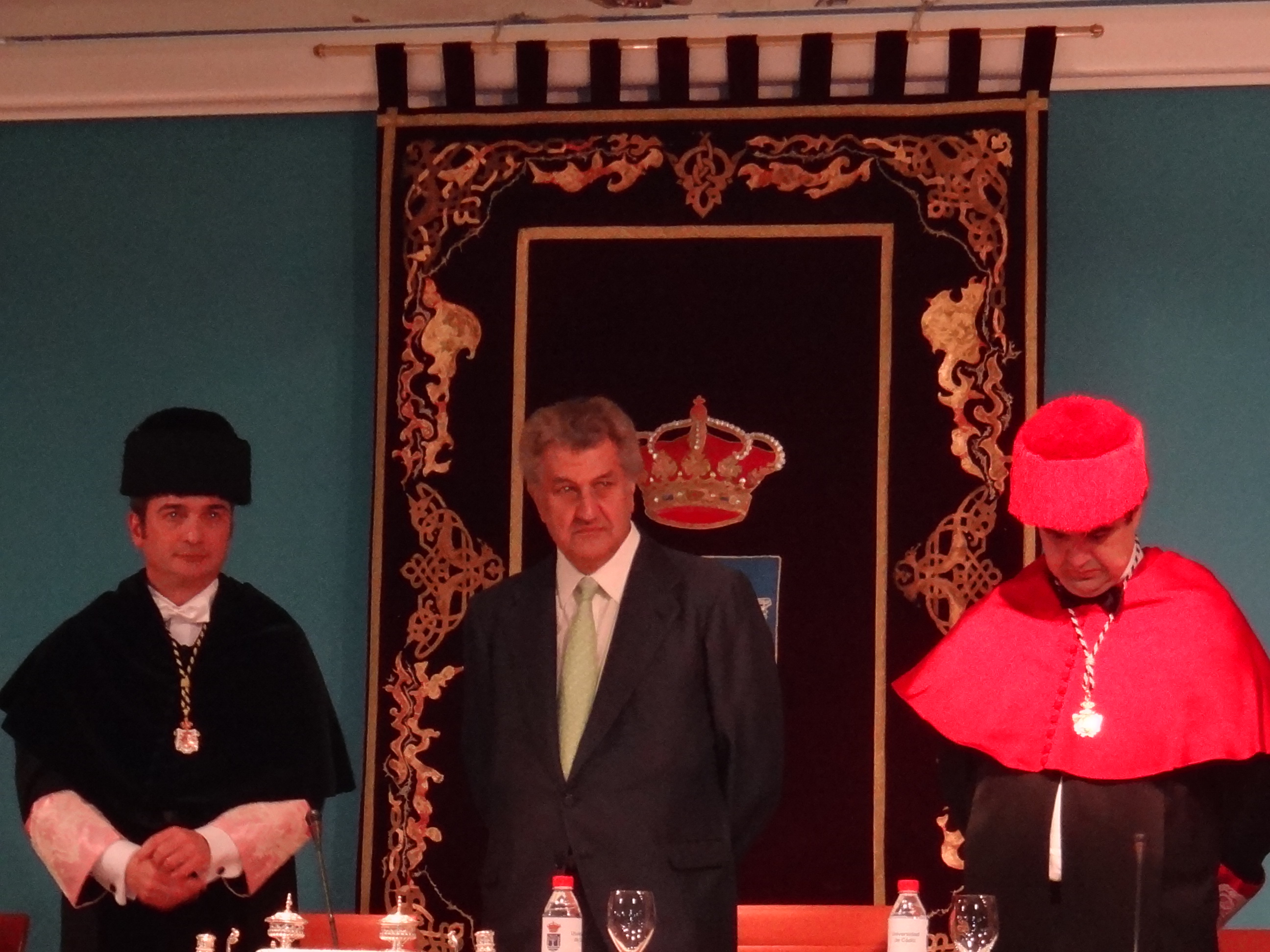 Jesús Posada (centro) y Eduardo González Mazo (izquierda) en el Claustro Extraordinario de la Universidad de Cádiz, acto de Investidura de nuevos Doctores